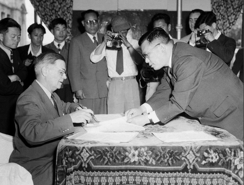 콜터 운크라단장 및 백두진국무총리 한국.운크라 원조조인식 참석